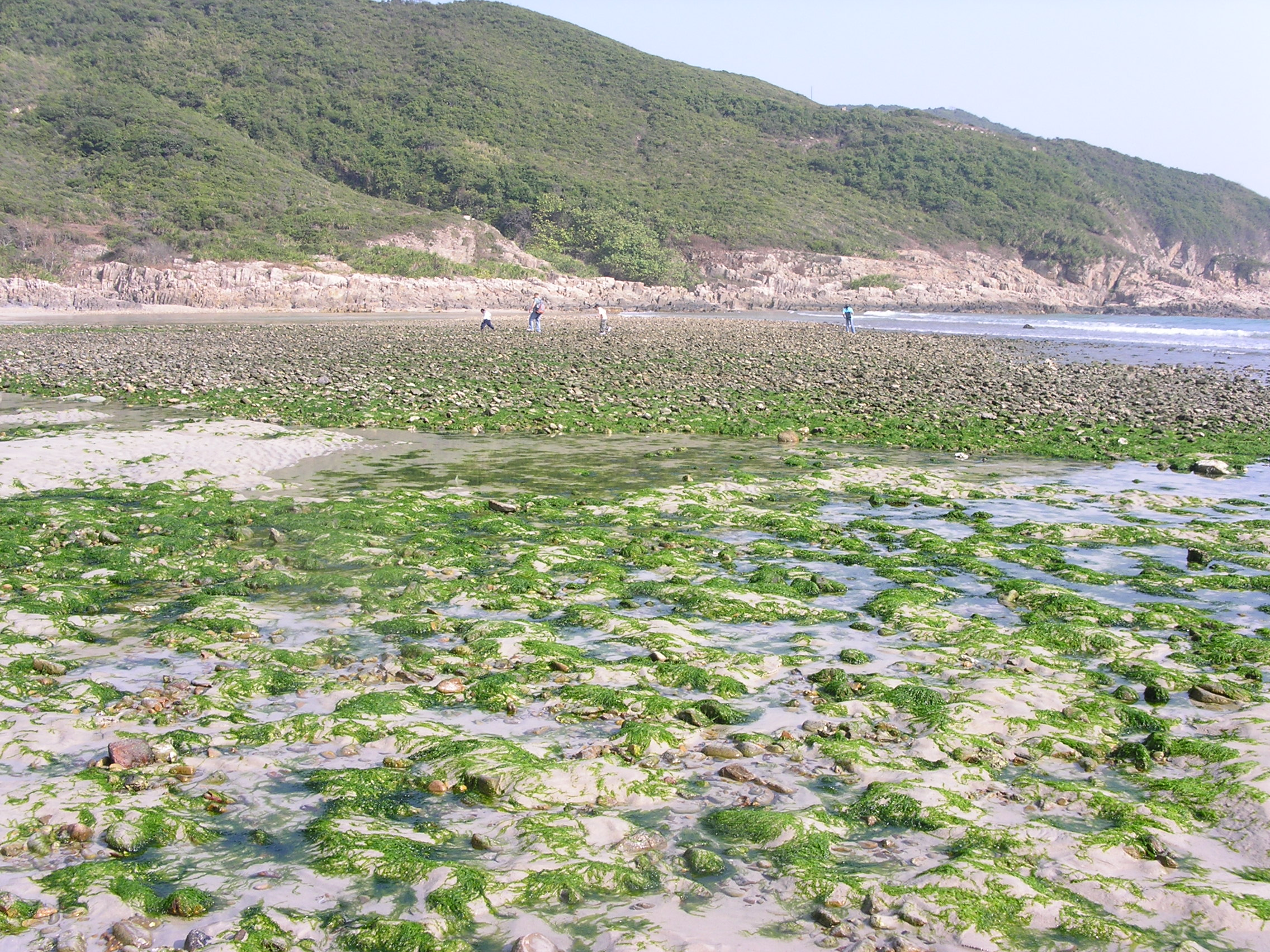 Green in Sai Wai,Hong Kong.冬天潮退時，從海中露出的大片海草，香港西灣灘。